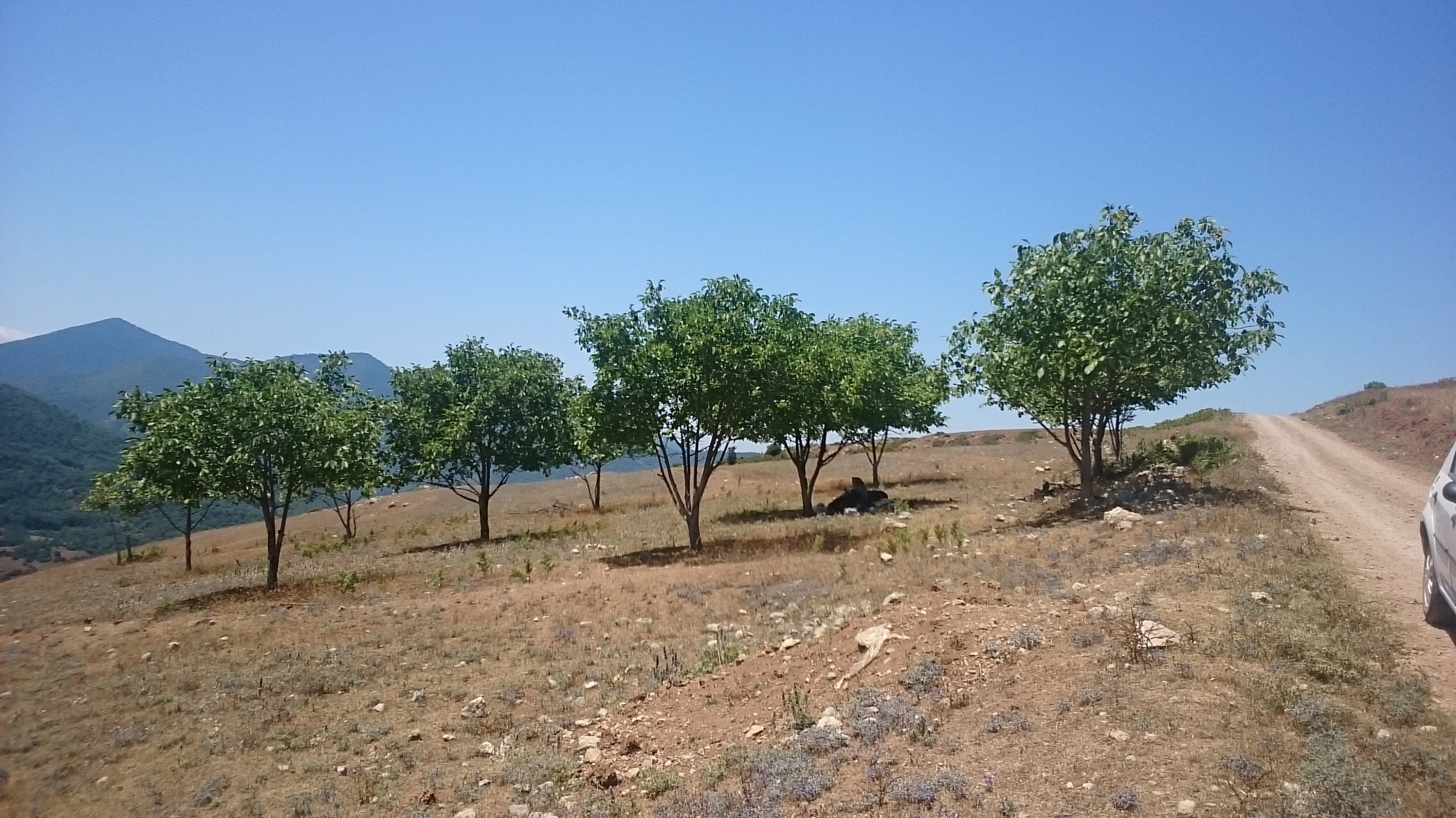 باغ گردو